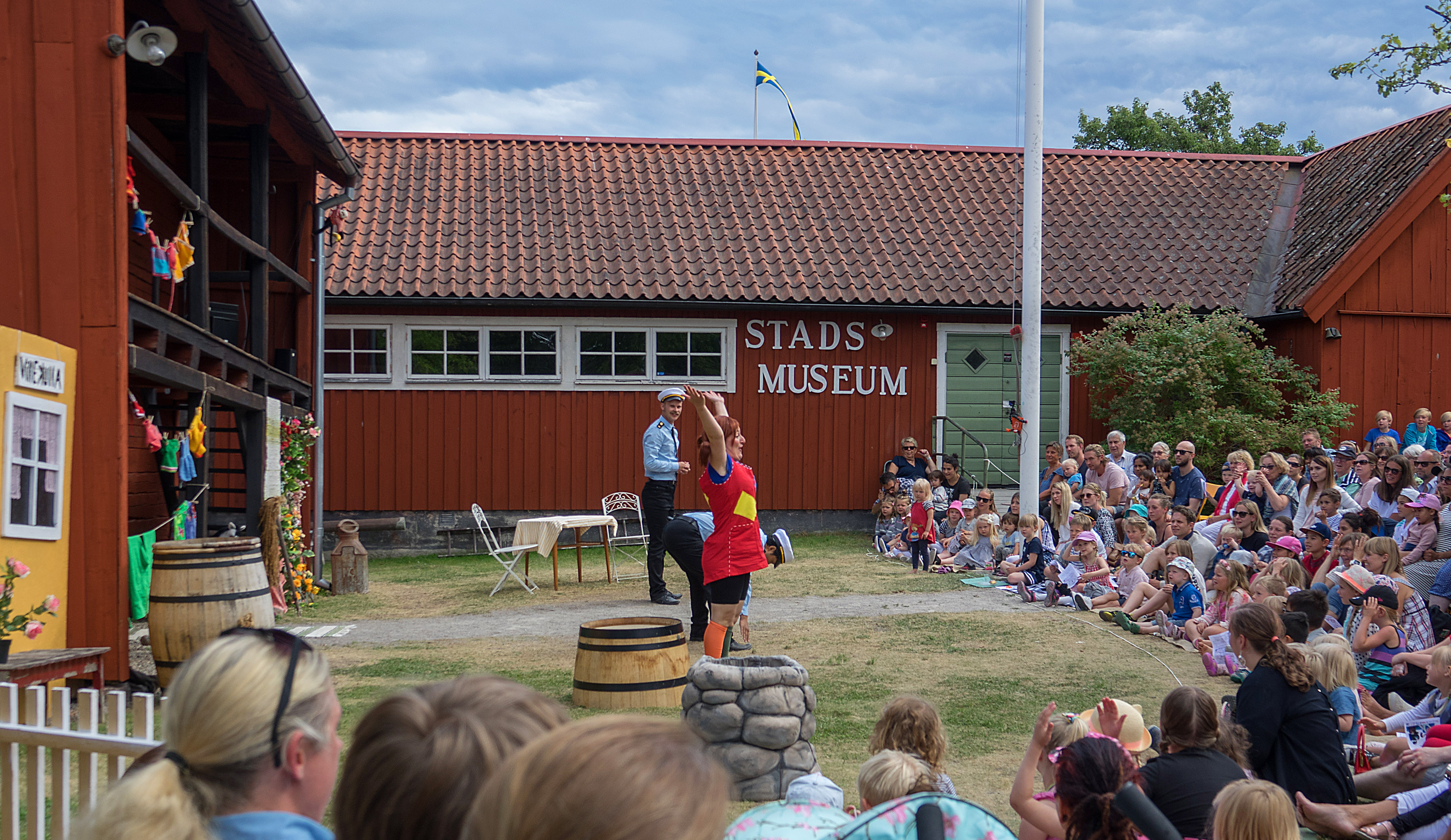 Från Föreställning på Trosa sommarteater 2017